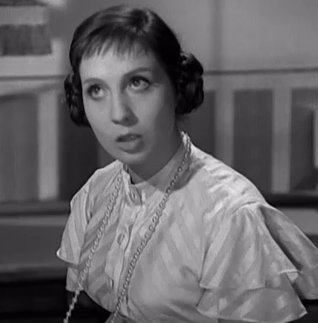 Rossella Como, screenshot da La nonna Sabella (1957) catturato personalmente